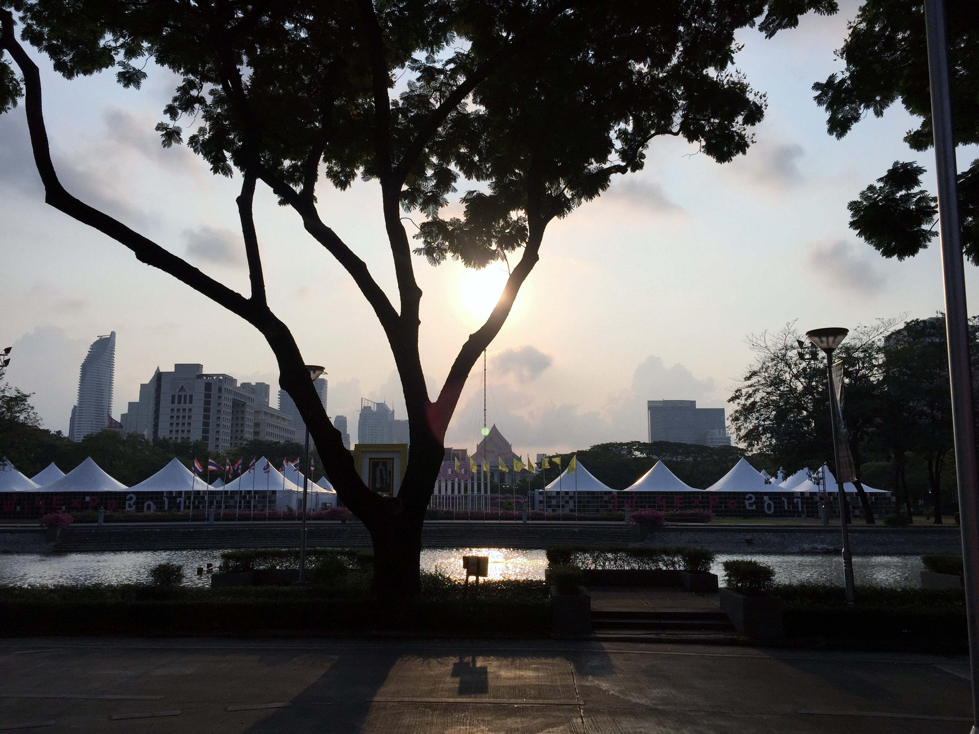 ซุ้มจัดแสดงนิทรรศการตั้งเรียงเป็นตัวย่อ "CU" กลางสนามรักบี้หน้าพระบรมราชานุสาวรีย์สองรัชกาล